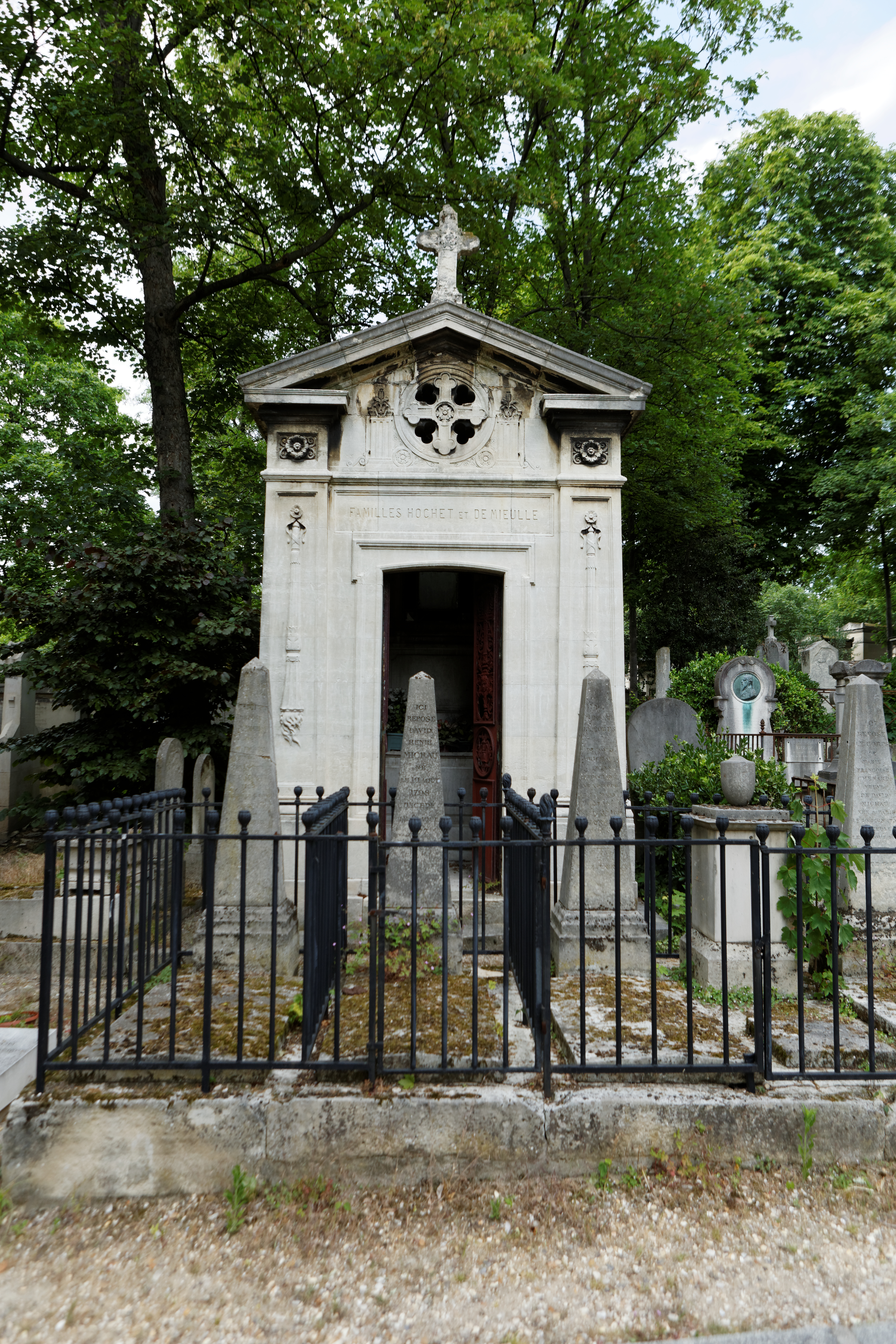 Sépulture de Claude Hochet (1772-1857), secrétaire général du Conseil d’État ; Prosper Hochet (1810-1883), député du Cher ; Jules Hochet (1813-1867), administrateur de la Compagnie du chemin de fer de Lyon à la Méditerranée et gérant de la Société Boigues & Cie.